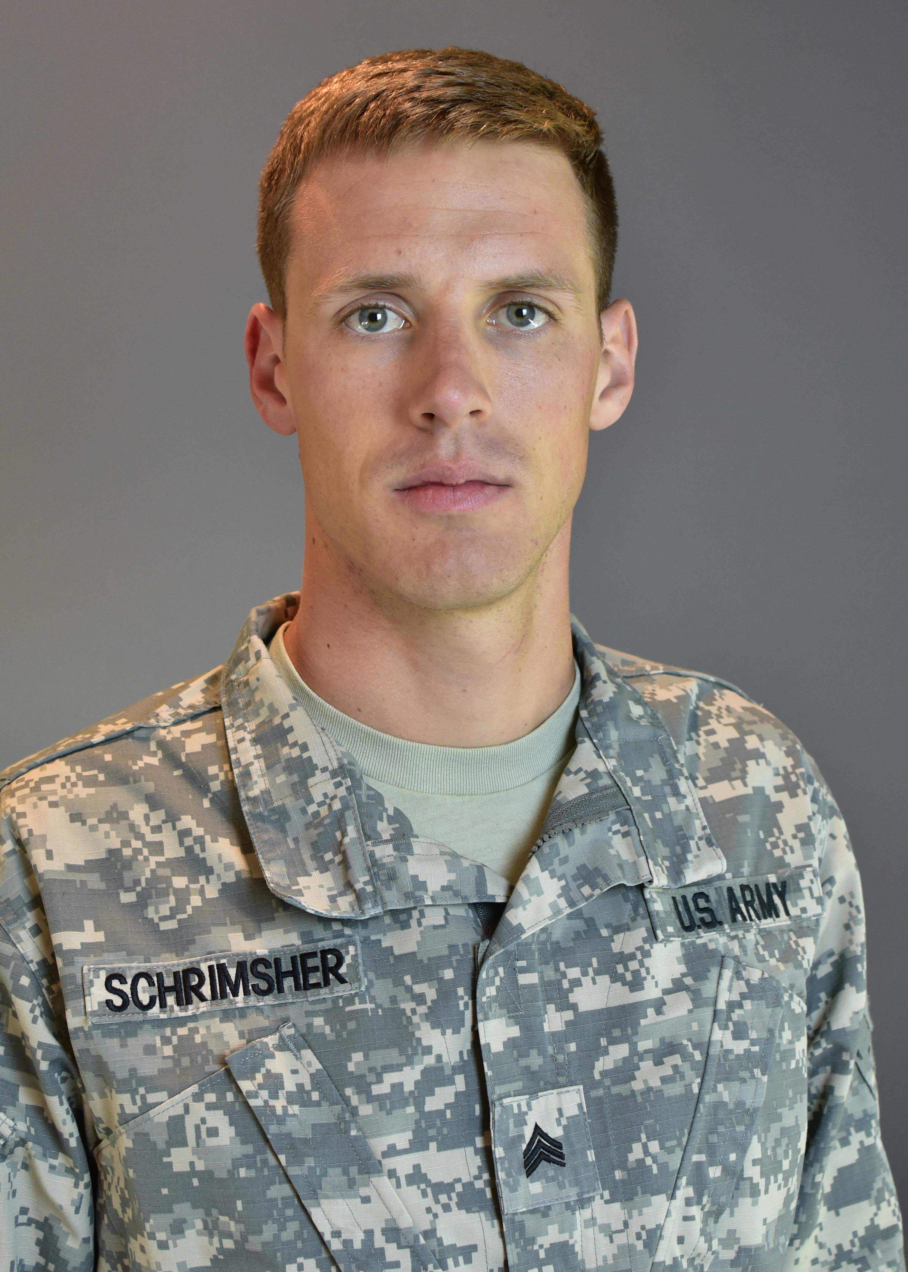 SGT SCHRIMSHER